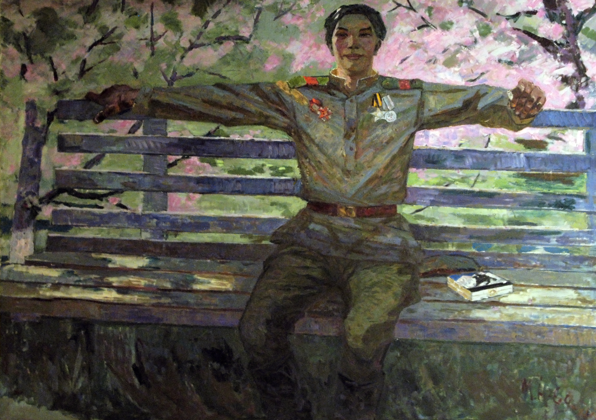 "Весна 1945 года". Холст, масло, 200*150 см, Молдабеков А., 1970 год